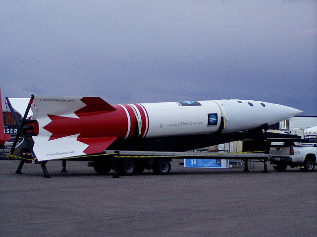 Maqueta de Canadian Arrow